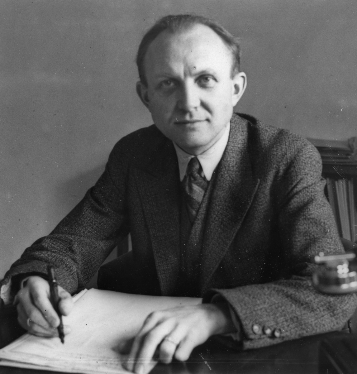 Halvor Skappel Solberg (født 5. februar 1895 i Ringsaker, død 31. januar 1974 i Oslo) var en norsk meteorolog kjent som en av grunnleggerne bak Bergensskolen innen meteorologi.